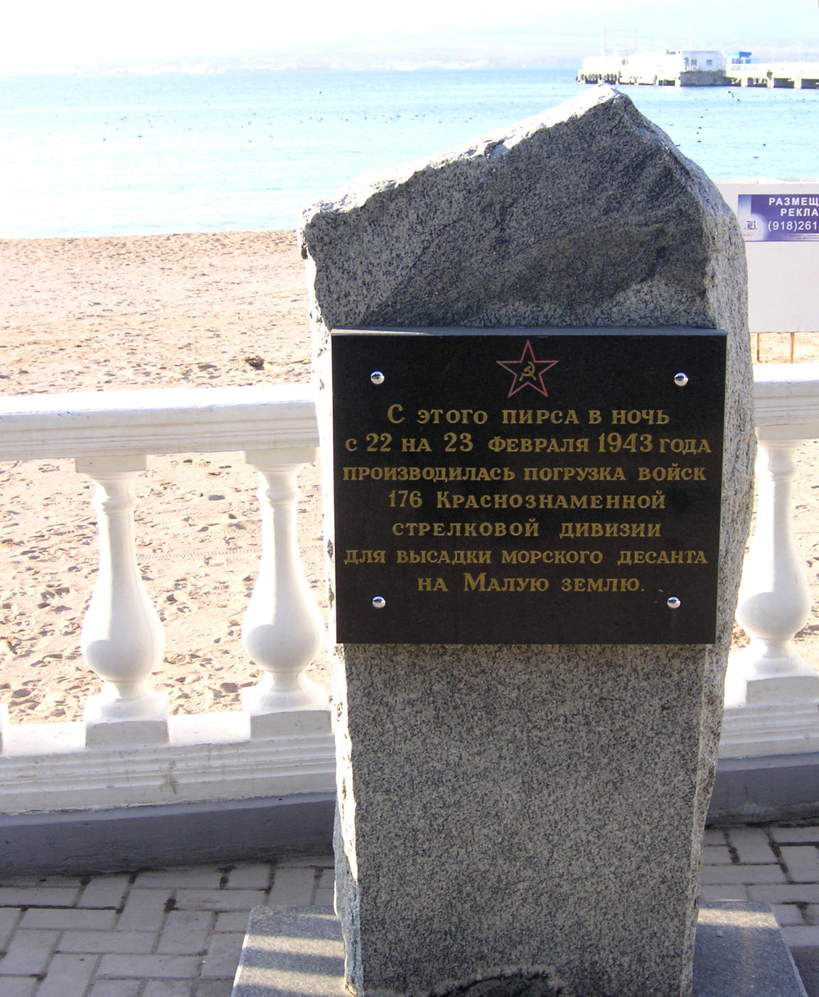 Геленджик. Памятный знак на месте погрузки войск для высадки десанта на Малую землю. Гранитный монумент с мраморной доскою, хранящей надпись: «С этого пирса в ночь с 22 на 23 февраля 1943 года производилась погрузка войск 176 Краснознамённой стрелковой дивизии для высадки морского десанта на Малую землю».